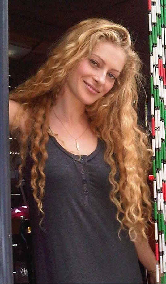 תמונת אפרת דור על הסט של עספור